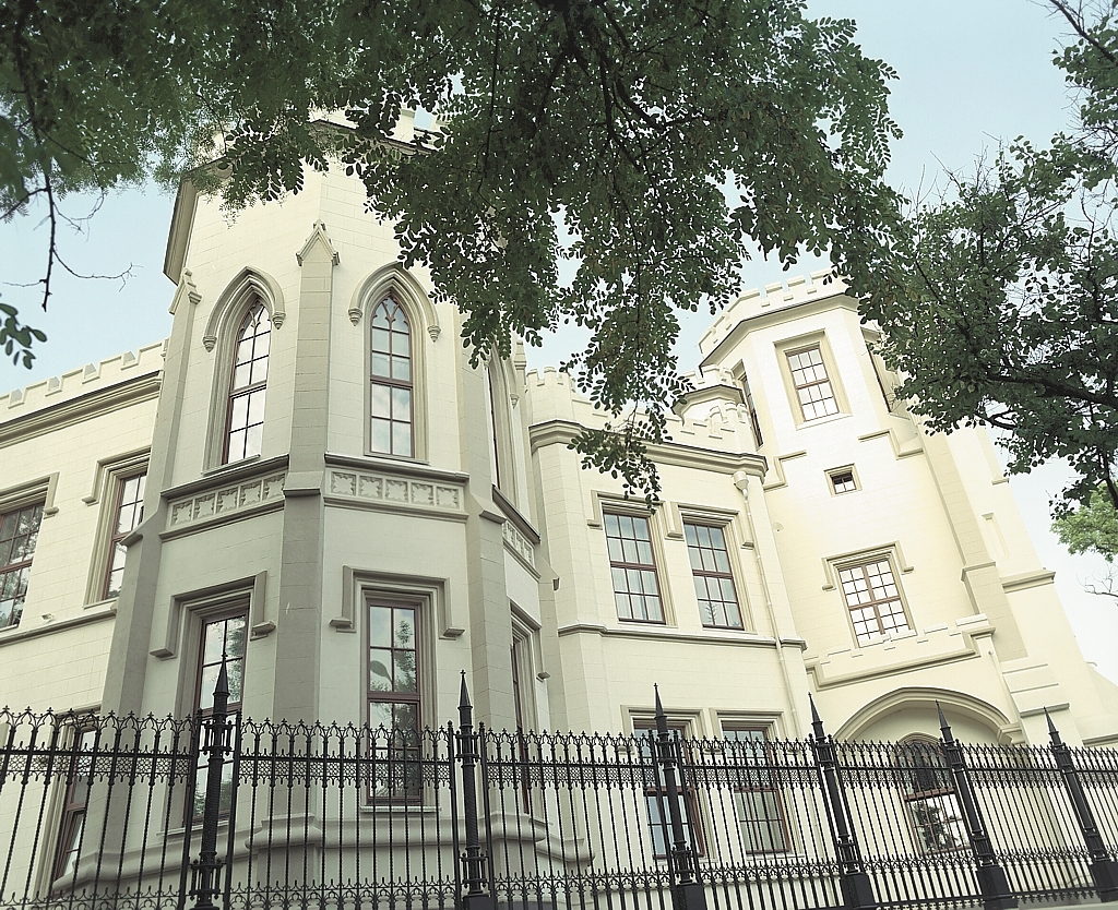 Шахский дворец, Одесса. После реконструкции